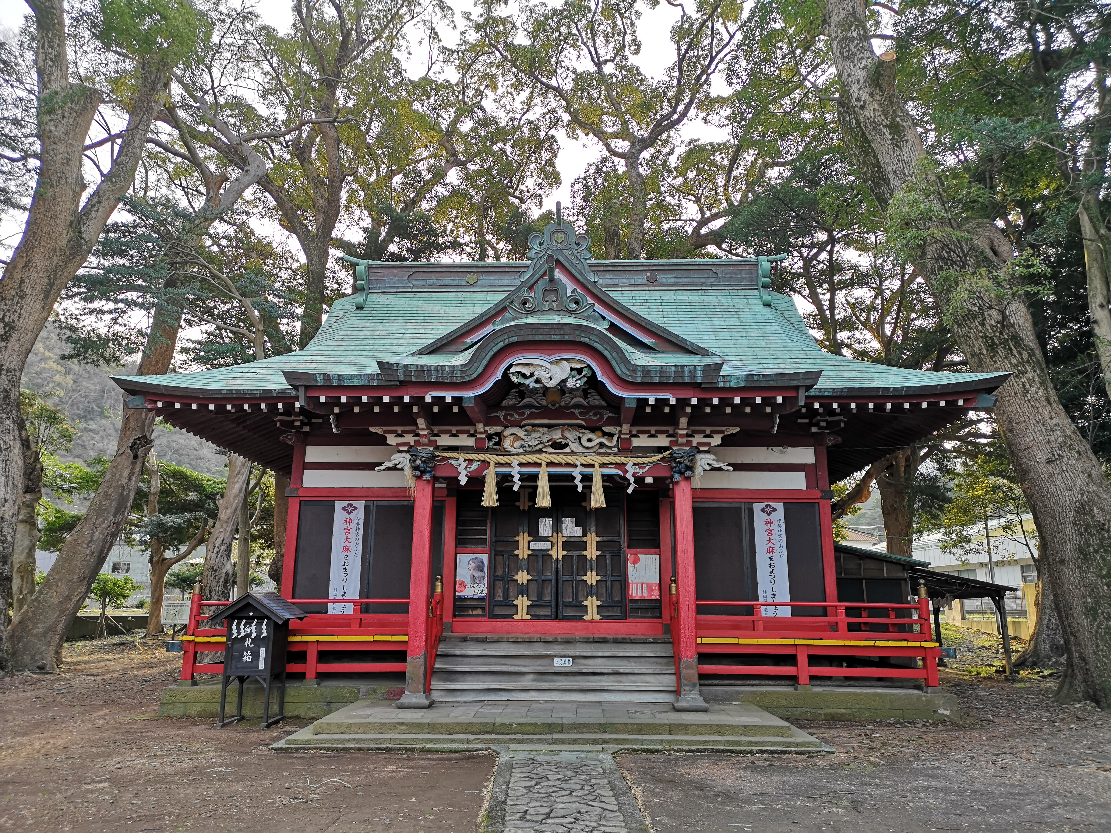 静岡県沼津市戸田にある部田神社 本殿